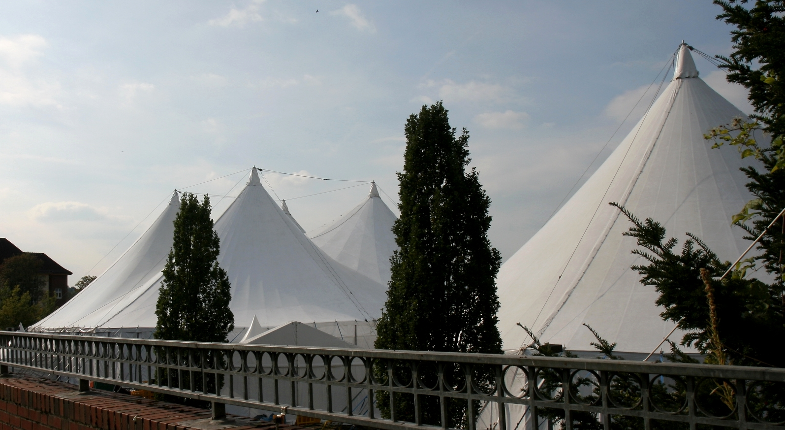 Zeltstadt (etwa 4000 qm groß) „Campus Symposium 2008“ in Iserlohn.